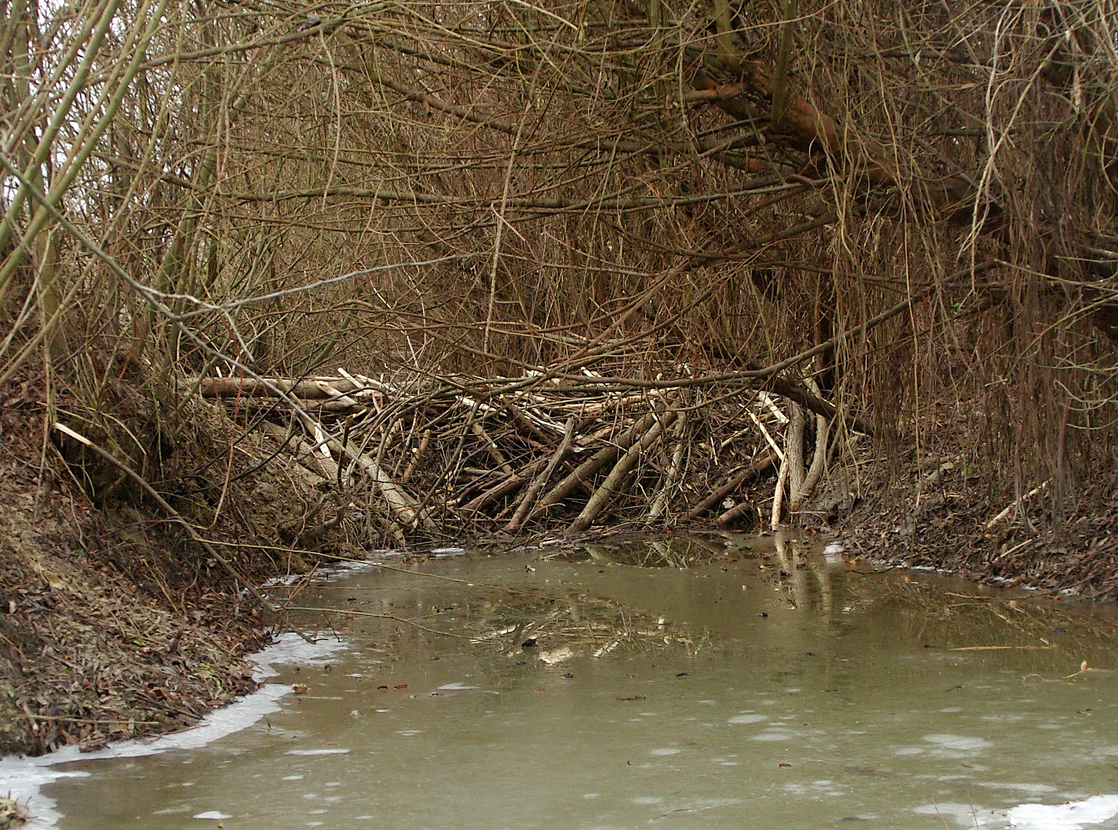 Tama bobrowa na potoku Młynówka, pogranicze miejscowości Bączal Górny i Bączal Dolny